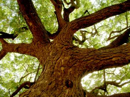 Neemtree - Dorf: Shamta, Bezirk: Porbandar, Land: Gujarat, Staat:Indien